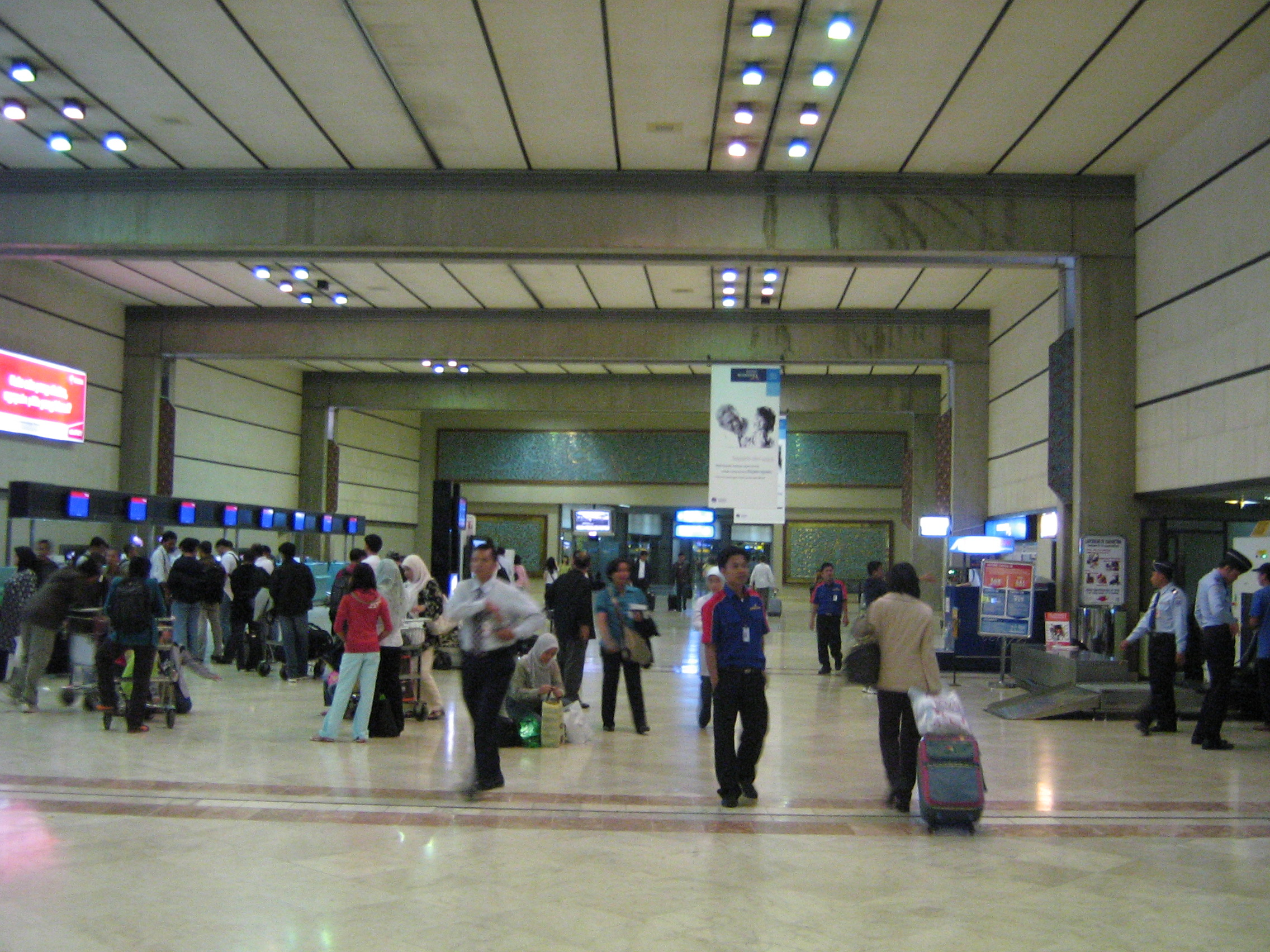 jakarta airport T2